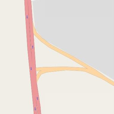 Гостомельська площа в Києві